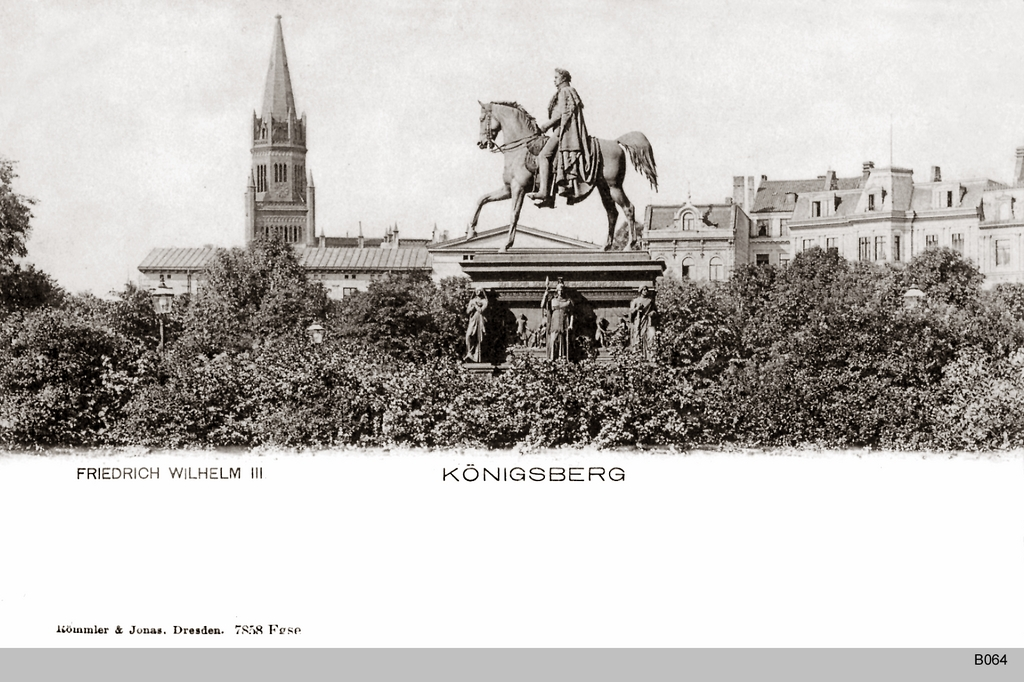 Königsberg